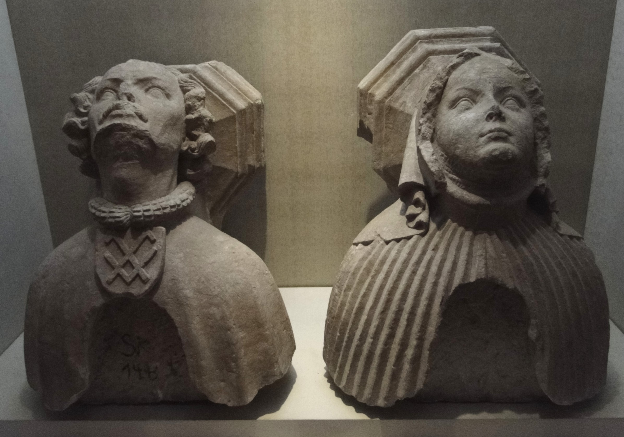 Konsolbüsten der Busmannkapelle der Sophienkirche in Dresden, derzeit im Stadtmuseum (Fotografie mit Fotoerlaubnis)